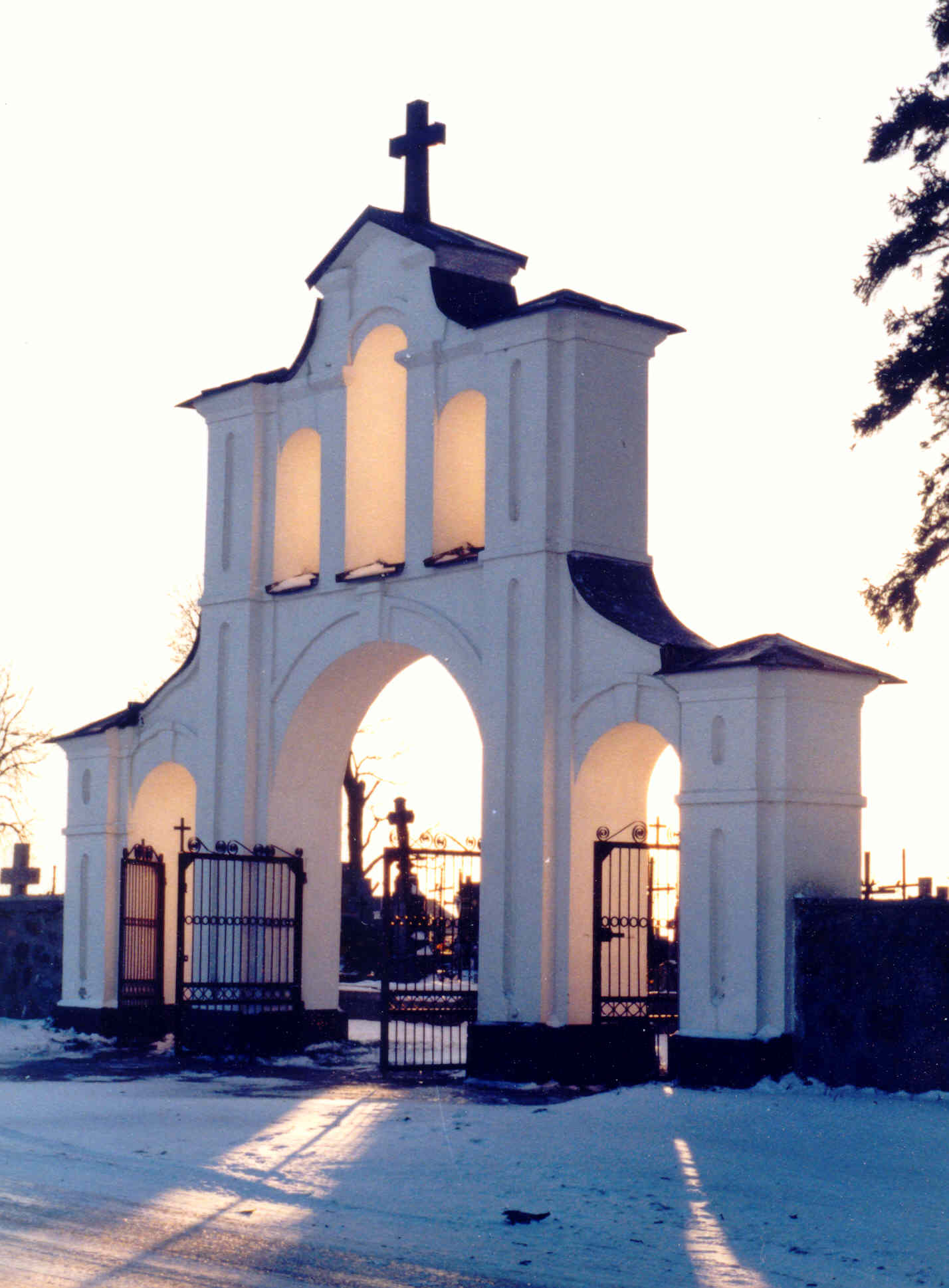 Huszlew, cmentarz